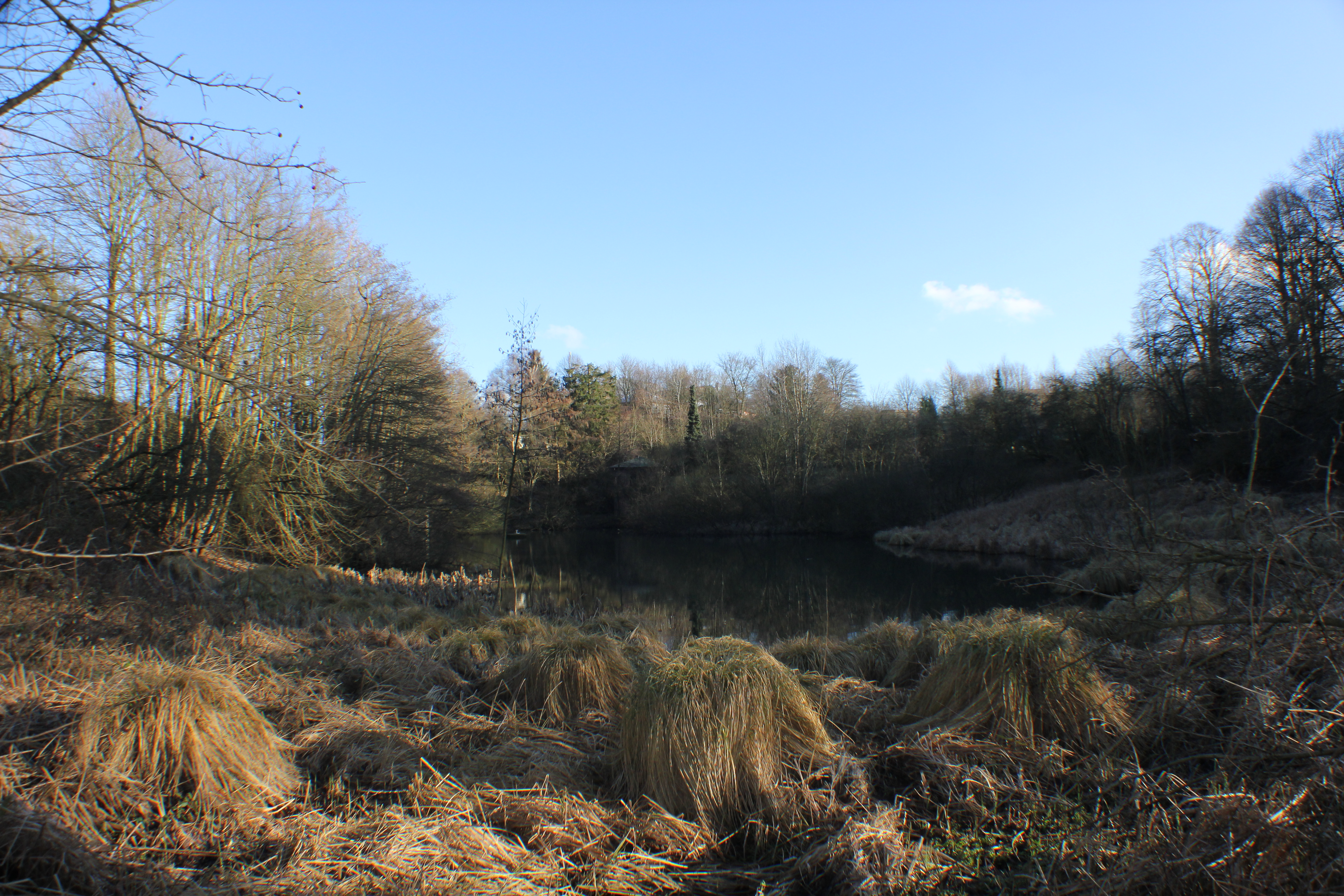 Rest vom Großen Mühlenteich – Der Lütte Mühlenteich (Flensburg), Bild 004